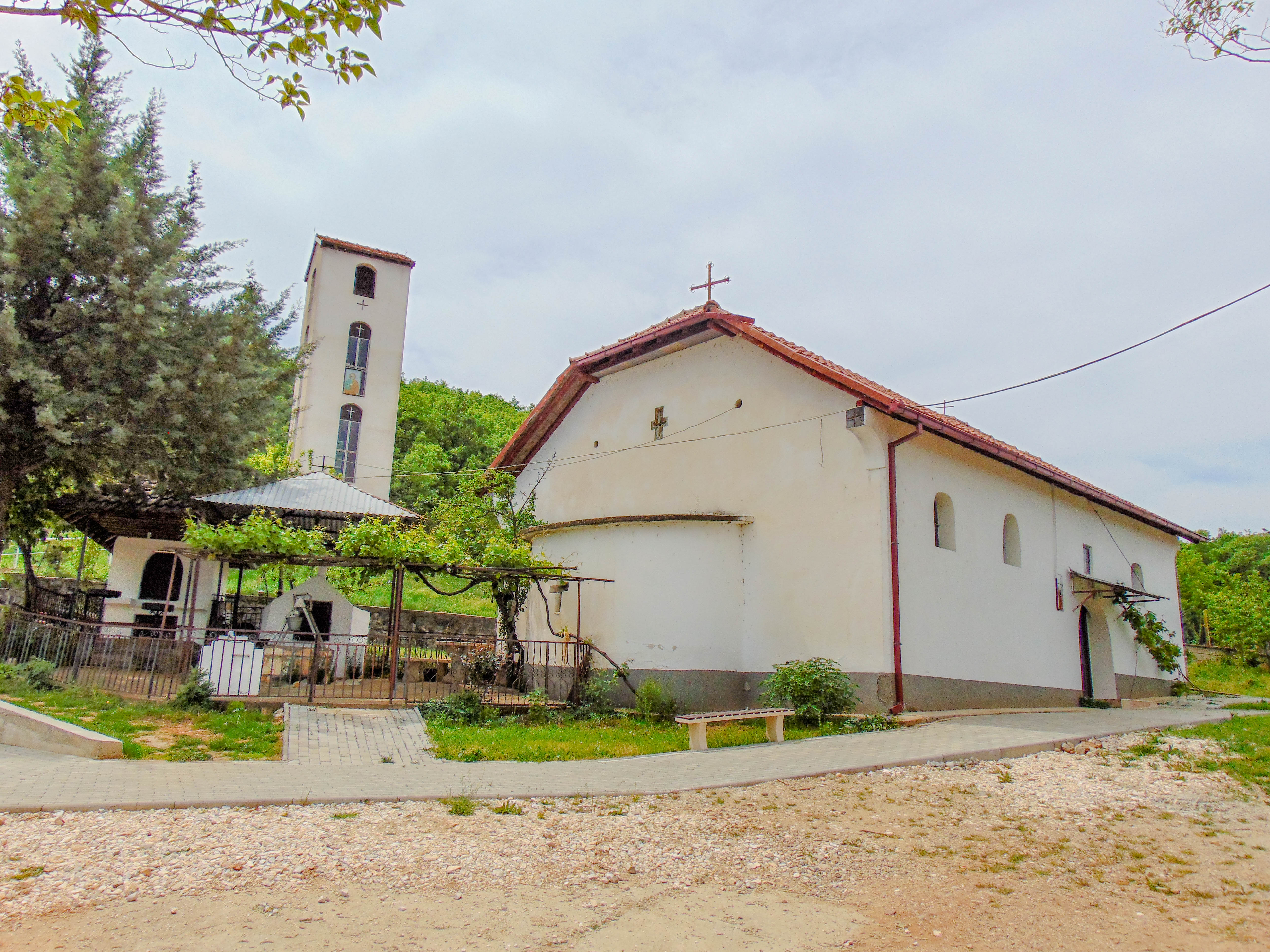 Црква „Св. Ѓорѓи“ - Калуѓерица